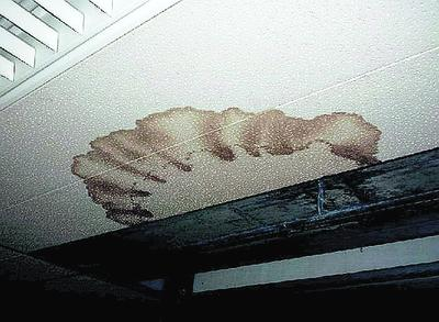 Das Foto zeigt einen Ausschnitt eines der Klassenräume der Georg-Büchner-Schule in Rodgau. Im Schuljahr 2004/2005 war dies der Klassenraum der 9-H.